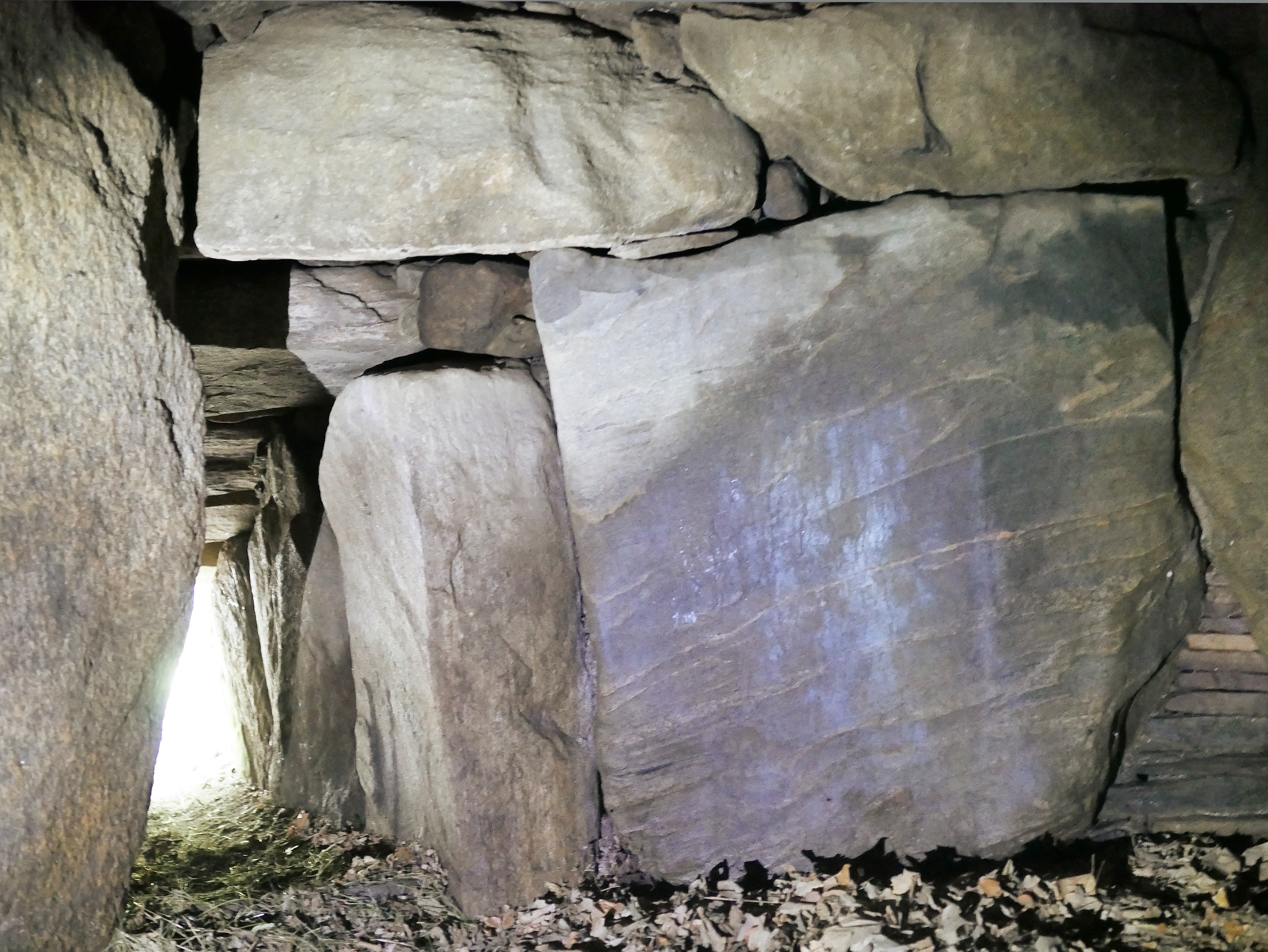 Kongehøjen rechte (östliche) Grabkammer, Eingangsbereich von innen